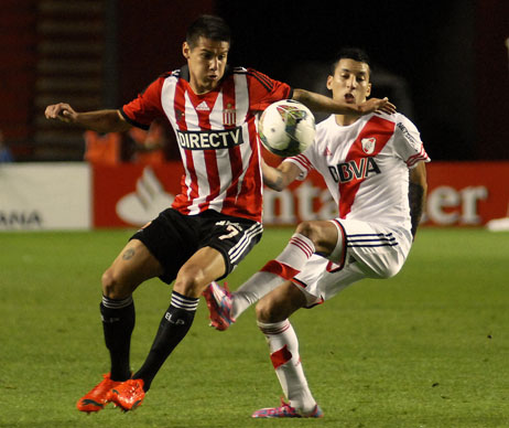 Los futbolistas Carlos Auzqui y Leonel Vangioni, de Estudiantes de La Plata y River Plate, durante el partido de ida de los cuartos de final de la Copa Sudamericana 2014.